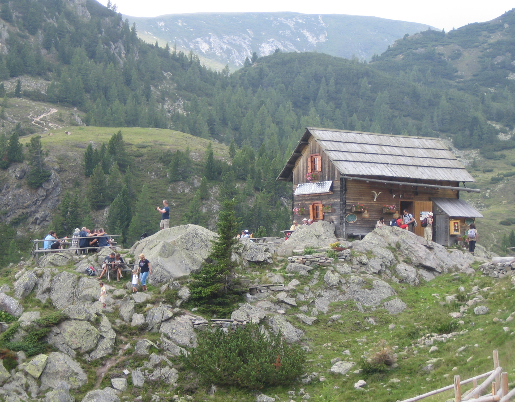 Touristisch bewirtschaftete Almhütte St. Oswalder Bockhütte in den Nockbergen / Gurktaler Alpen (bei Bad Kleinkirchheim)